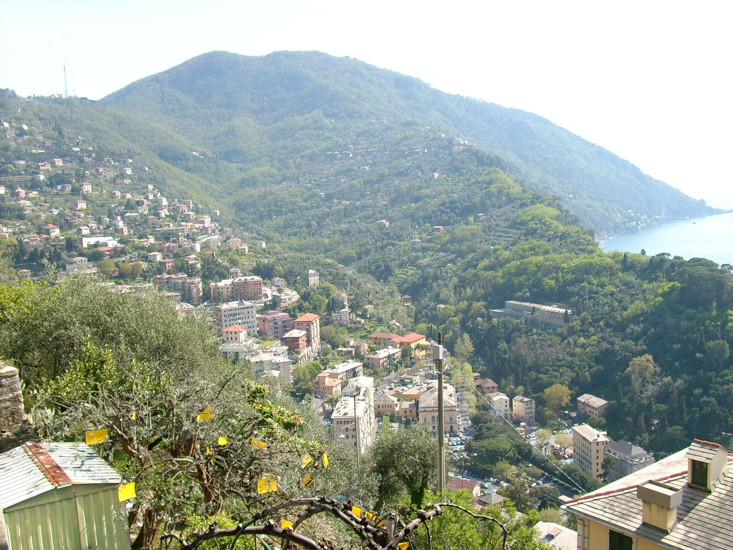 Vista di Ruta e San Rocco di Camogli, Liguria, Italia